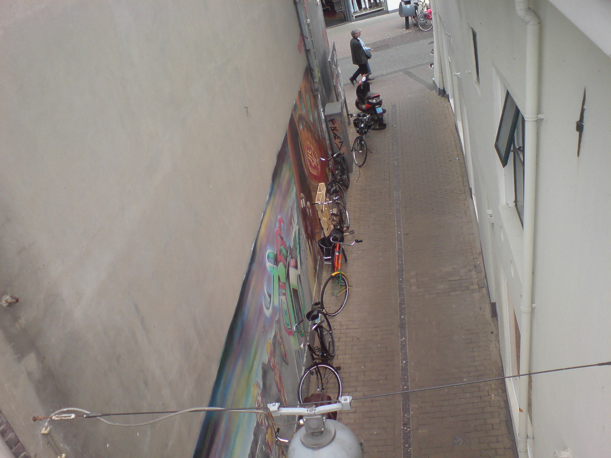 Foto Koningsplen Zwolle, genomen vanuit 5A, richgting Diezerstraat